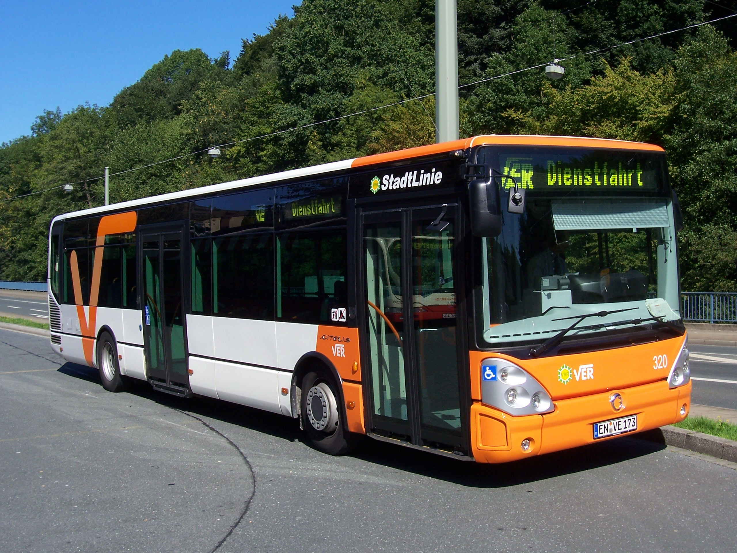 Ein Irisbus Citelis Stadtbus der Verkehrsgesellschaft Ennepe-Ruhr (VER) an der Haltestelle Ennepetal Busbahnhof